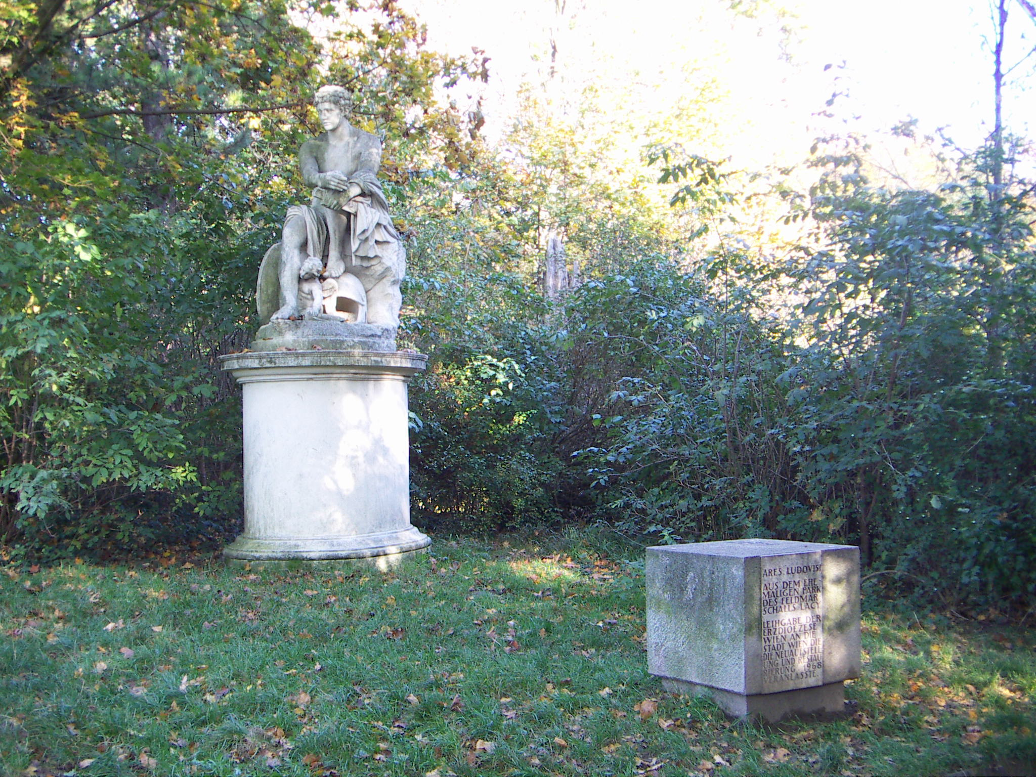 Sculptur des Ares im der Schwarzenbergallee in Wien-Hernals, aus dem ehemaligen Park des Feldmarschalls Franz Moritz von Lacy